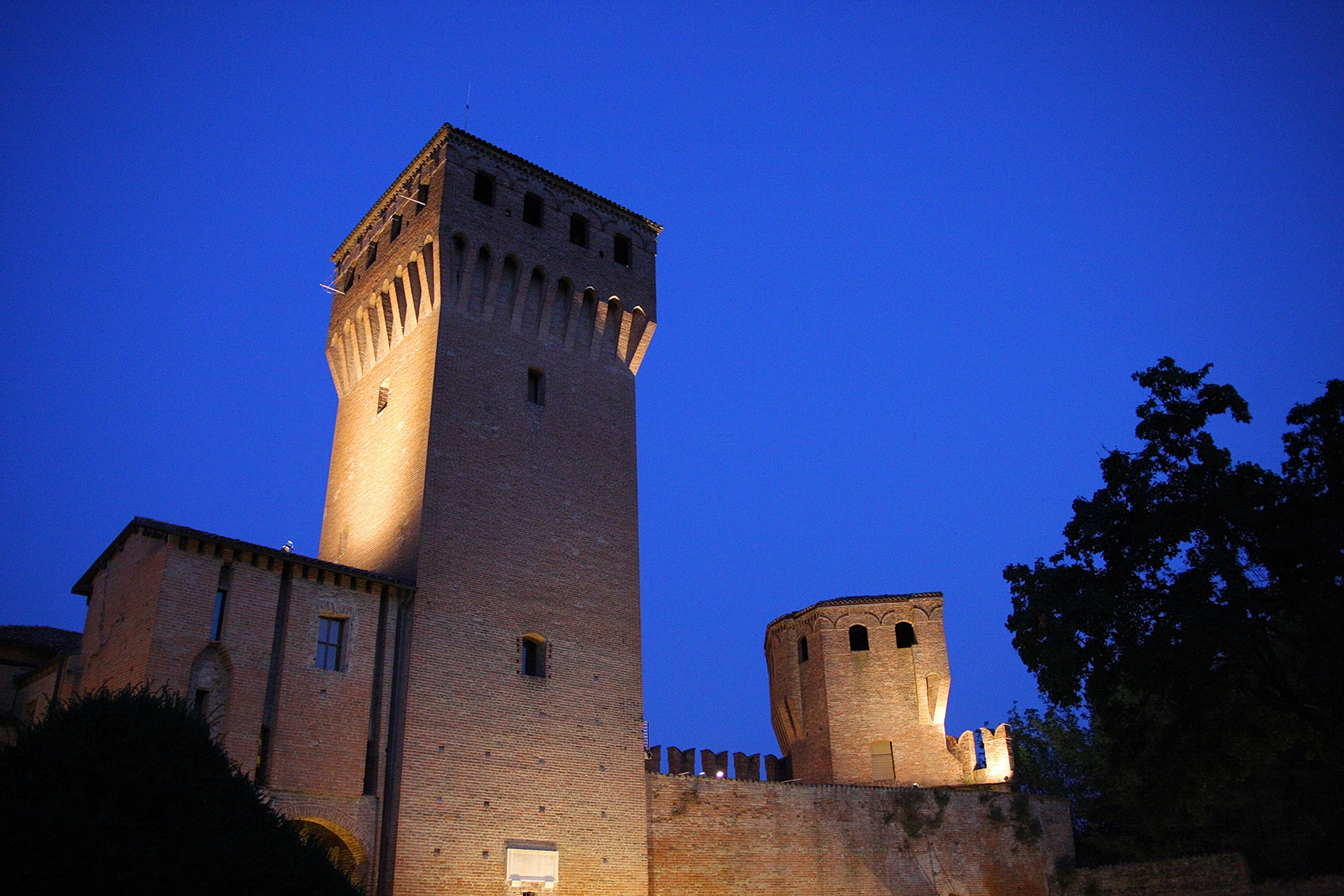 Château de Formigine, Modène, Italie